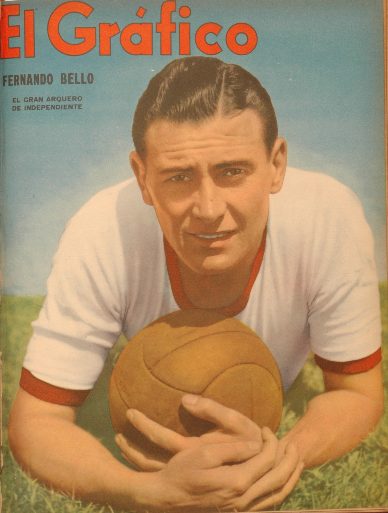 El Grafico del 22 de Noviembre de 1940. Edicion 1115